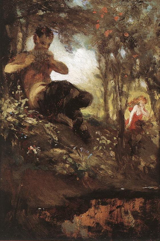 (study)